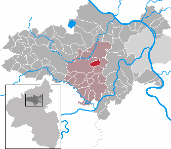 Kerben in Rhineland-Palatinate - district Mayen-Koblenz